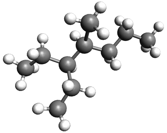 Molécule de 3-éthyl-4-méthylheptane